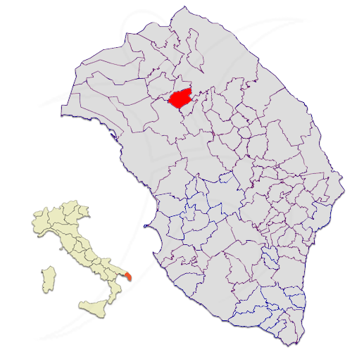 Il territorio del comune di Monteroni di Lecce in provincia di Lecce